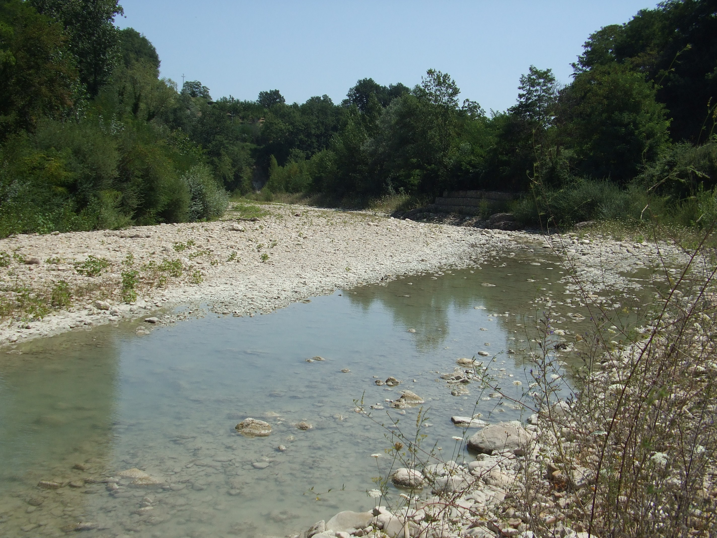 Fiume Fino in prossimità di Bisenti